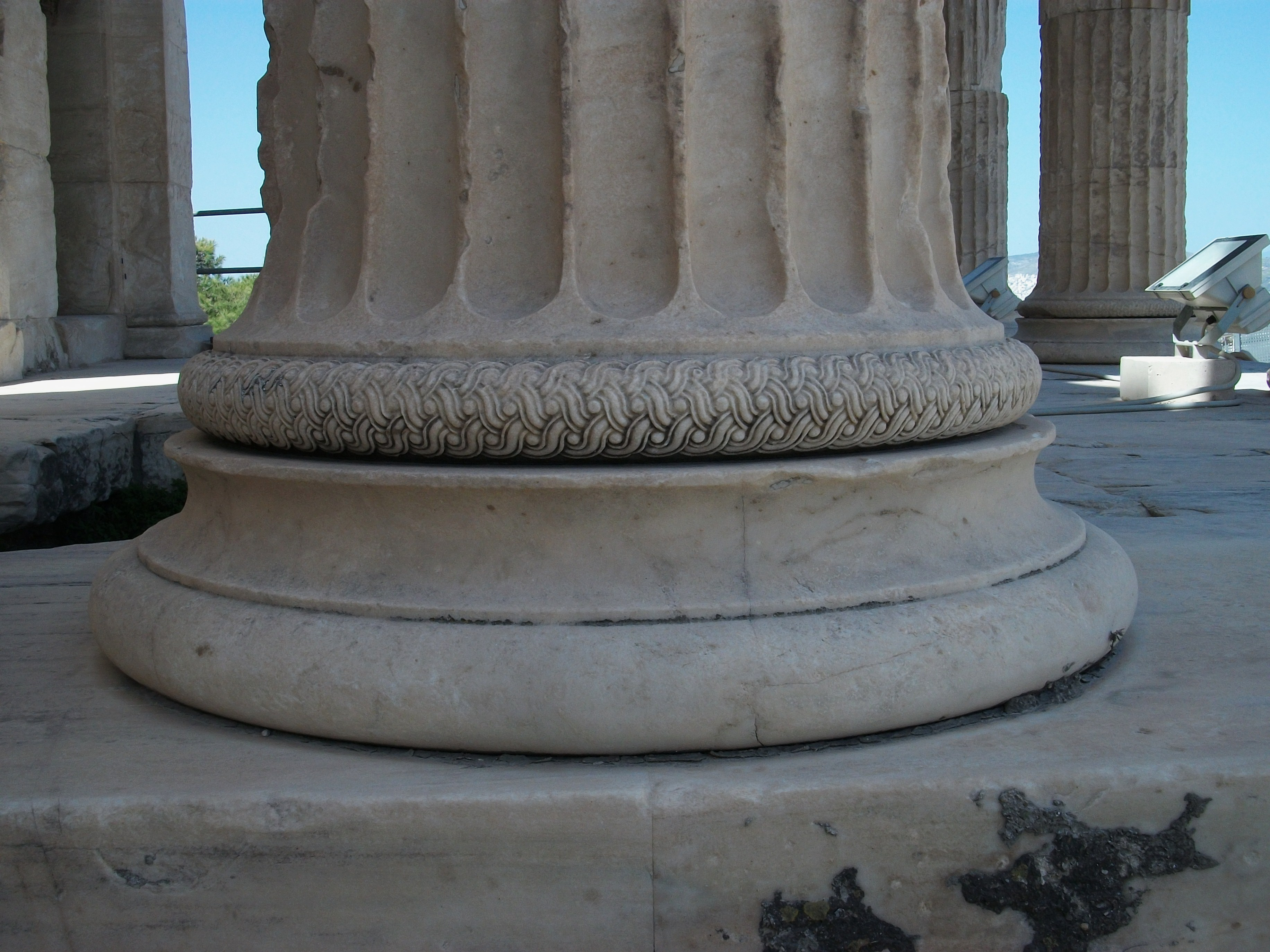 Base d'una columna de l'Erectèon.